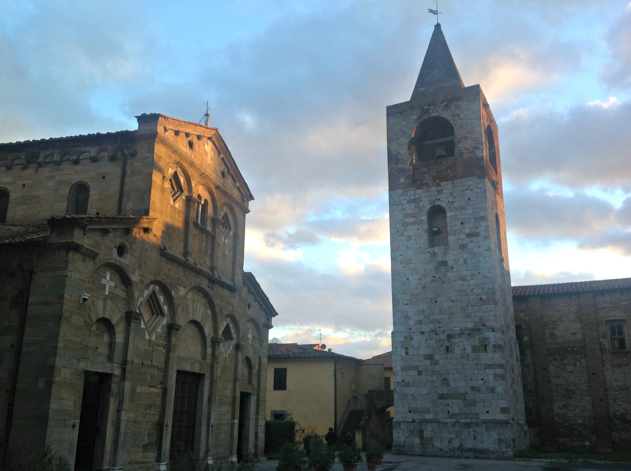 Chiesa e campanile di San Giovanni e Santa Maria Assunta, Cascina